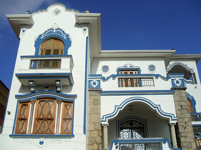 Museu dos Óculos Gioconda Giannini, no Bixiga, São Paulo, Brasil.